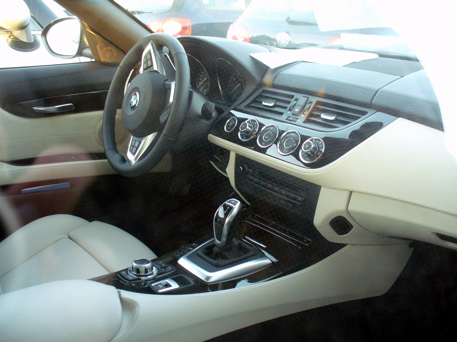 BMW Z4 sDrive35i